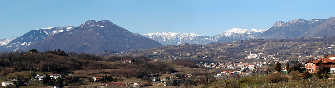 Autore: Euro Grotto Vista panoramica dalle colline adiacenti